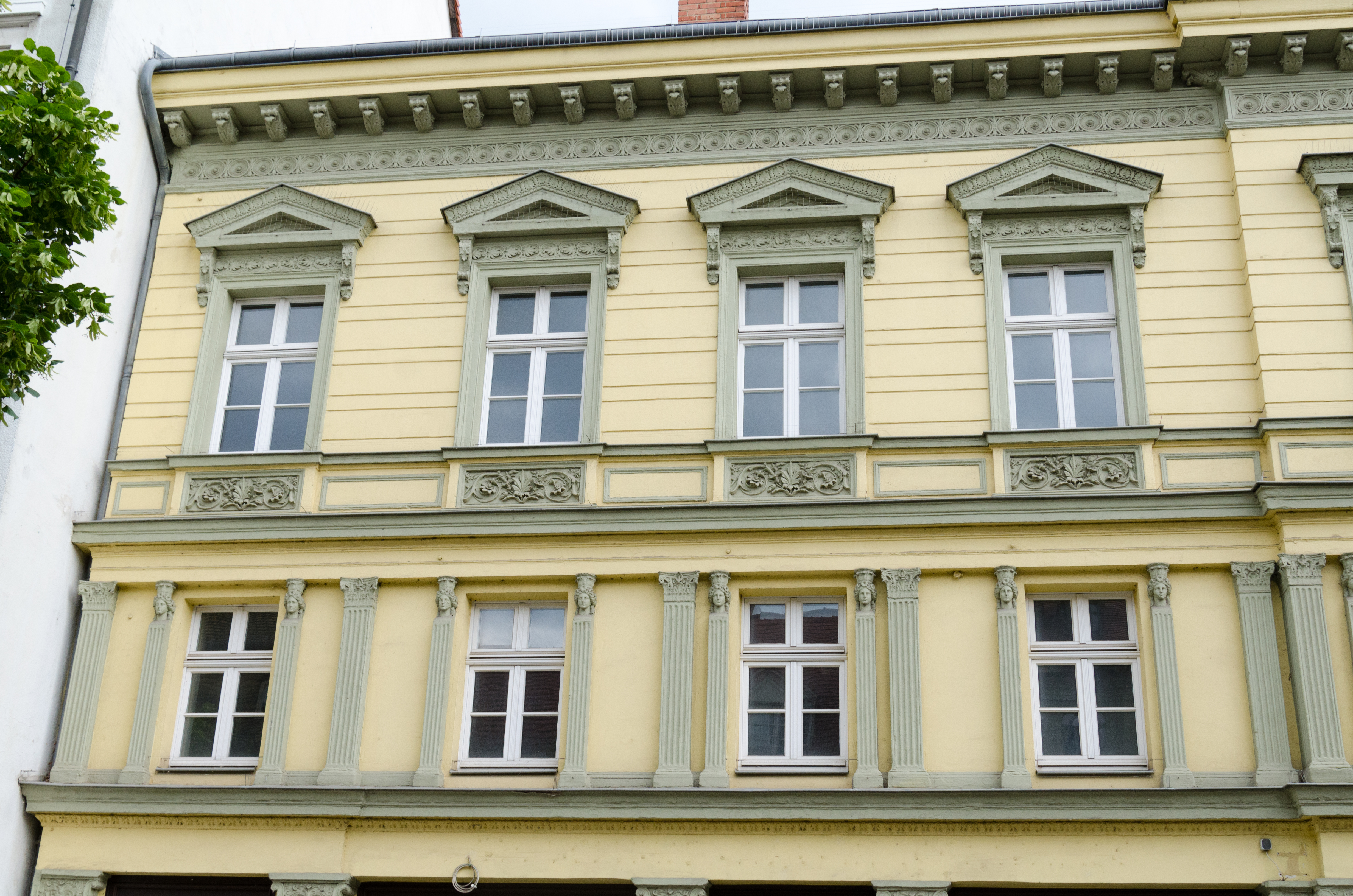 Zeitz, Roßmarkt 3